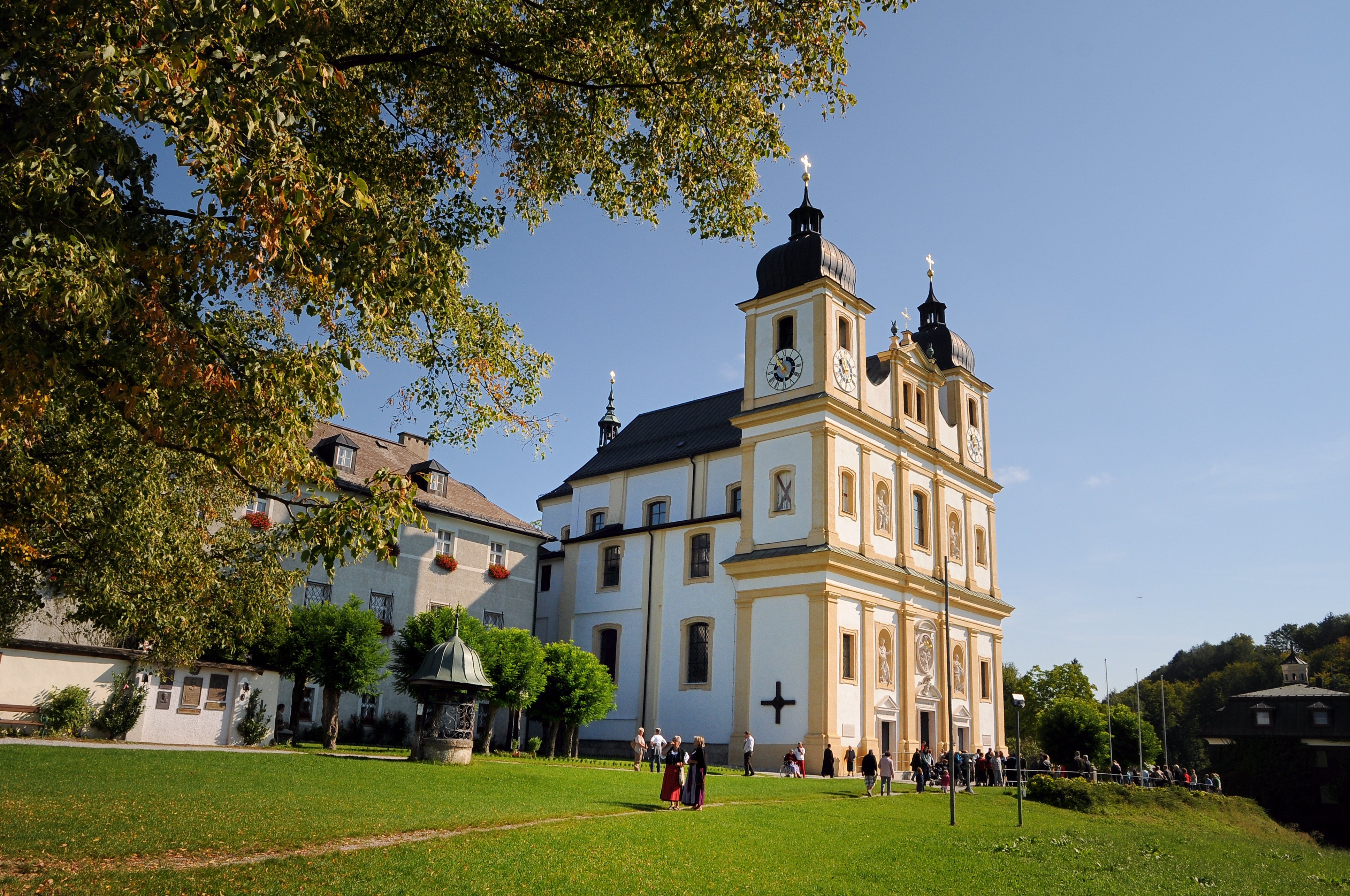 Maria Plain ist ein römisch-katholischer Wallfahrtsort in der Gemeinde Bergheim im Norden des österreichischen Bundeslandes Salzburg. Die Wallfahrtsbasilika Mariæ Himmelfahrt (15. August) auf dem Plainberg nördlich von Salzburg bildet mit den sie umgebenden Kapellen und Gebäuden ein geschlossenes barockes Ensemble. In der Wallfahrtskirche wird das Gnadenbild Maria Plain „Maria Trost“ verehrt.